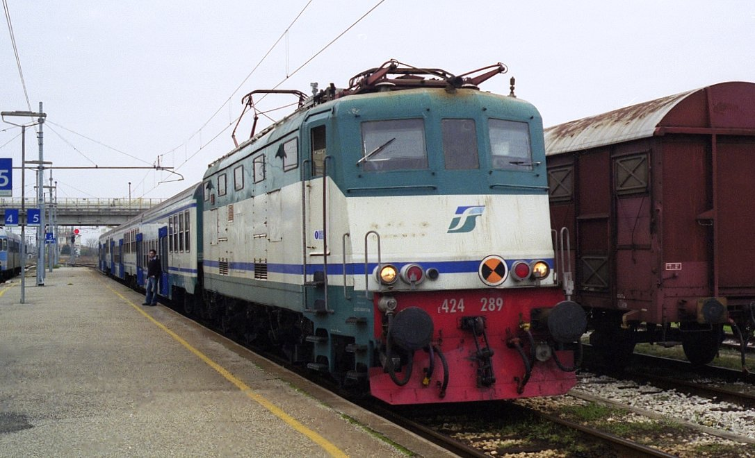 Locomotiva E.424.289 delle Ferrovie dello Stato in sosta a Suzzara